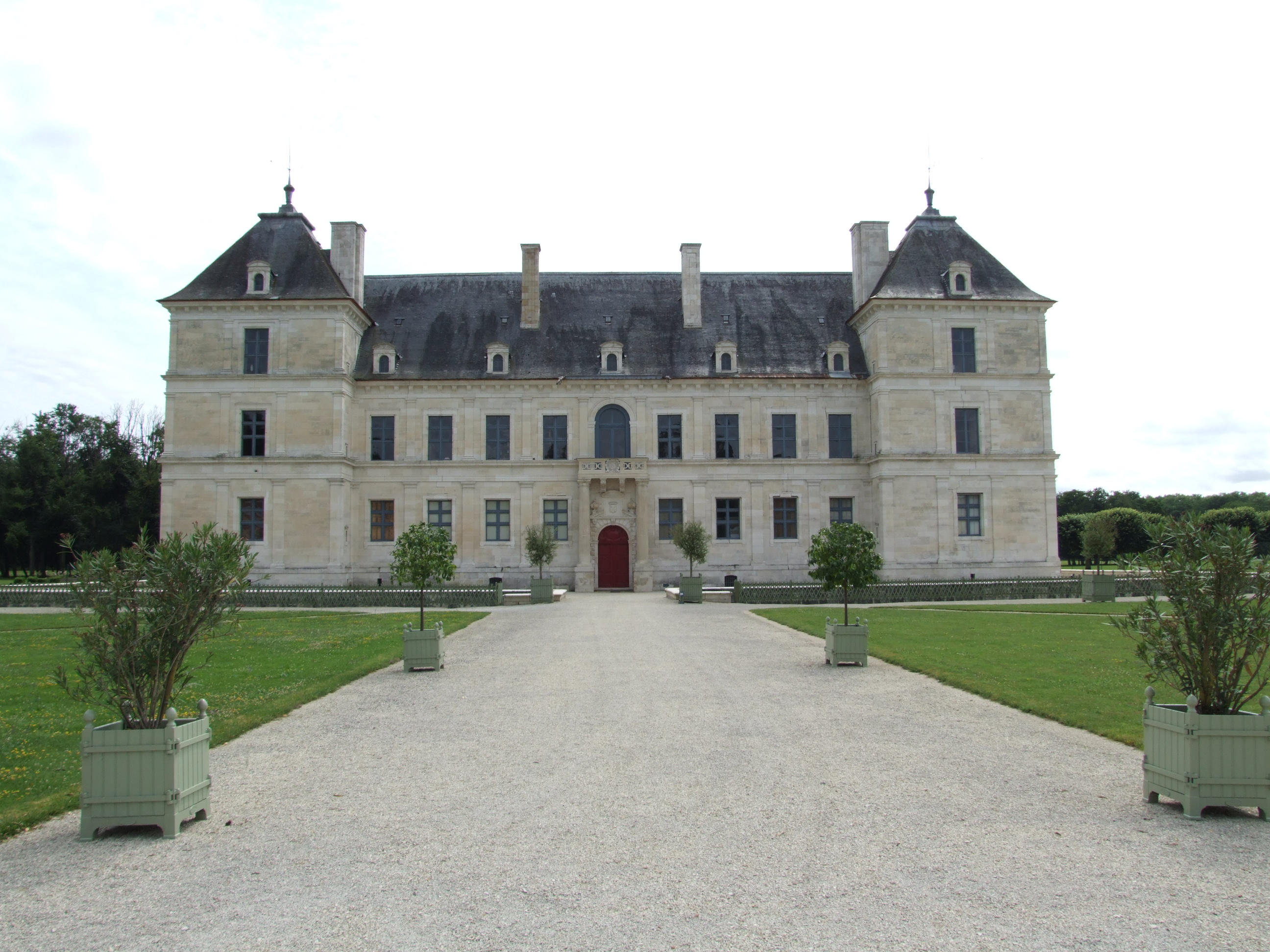 Château d'Ancy-le-Franc, Yonne, Bourgogne, FRANCE